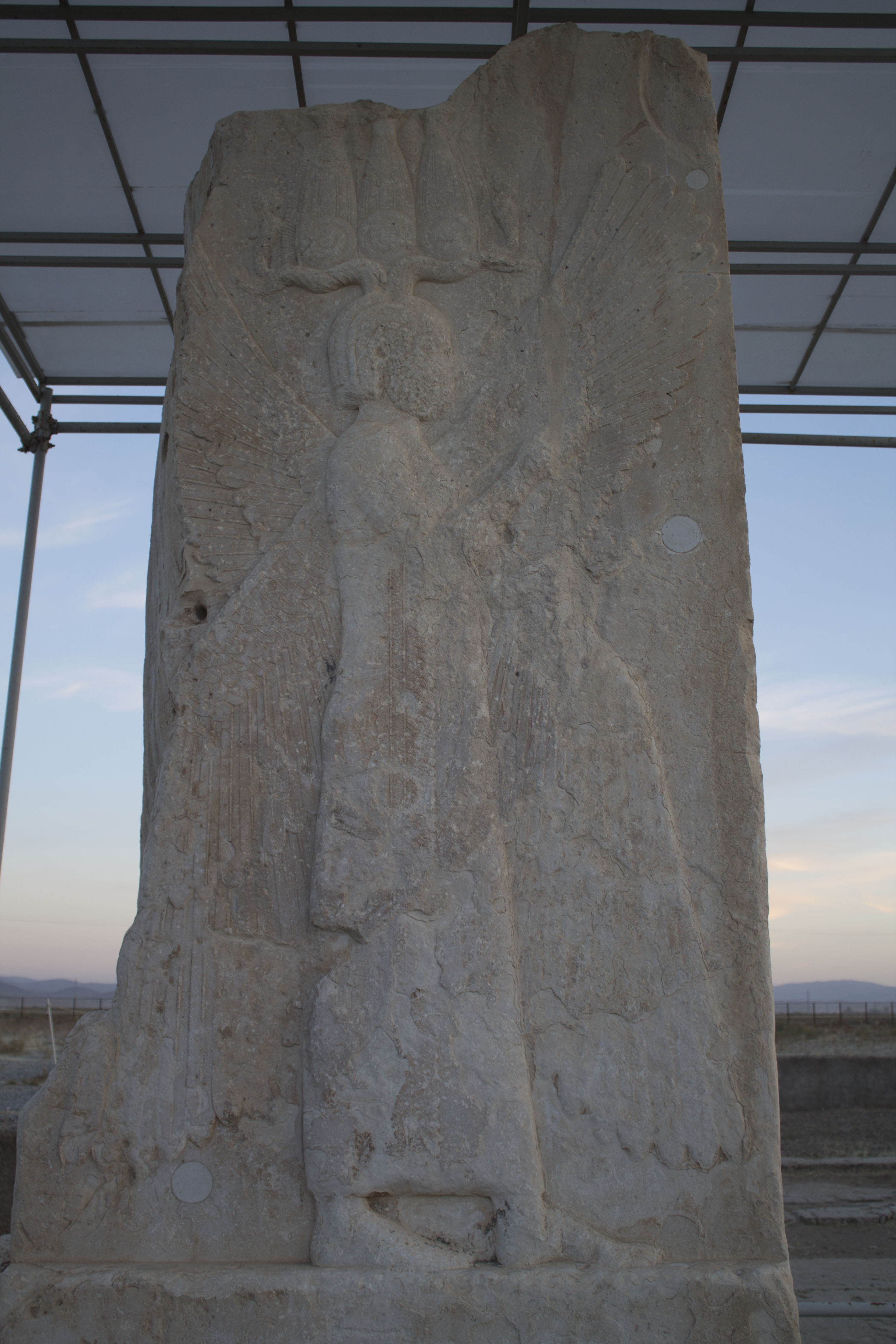 باستان شناسی